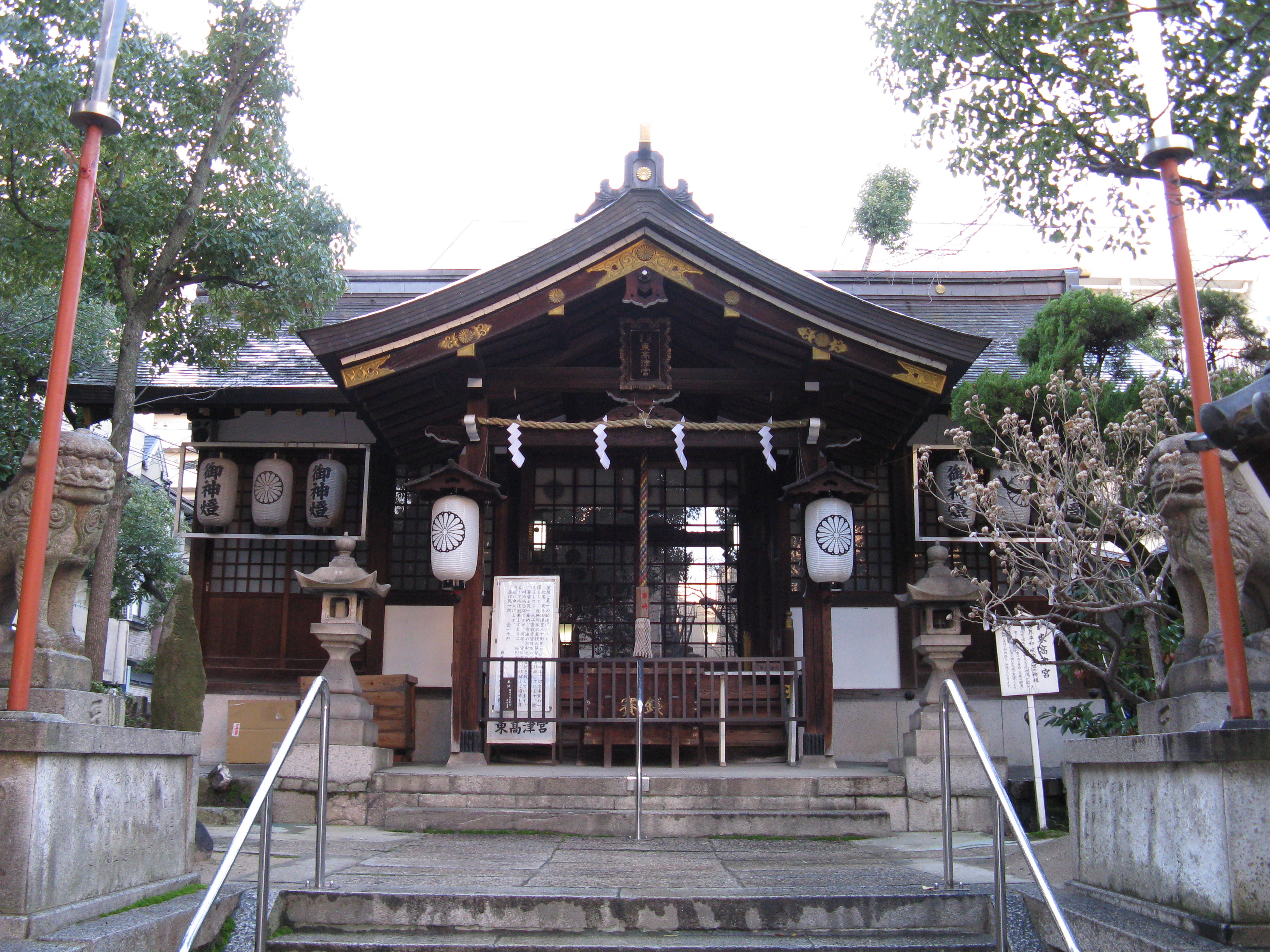 東高津宮 拝殿